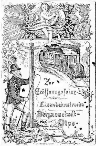 Festschrift-Titelseite „Zur Eröffnungsfeier der Eisenbahnstrecke Bergneustadt–Olpe“